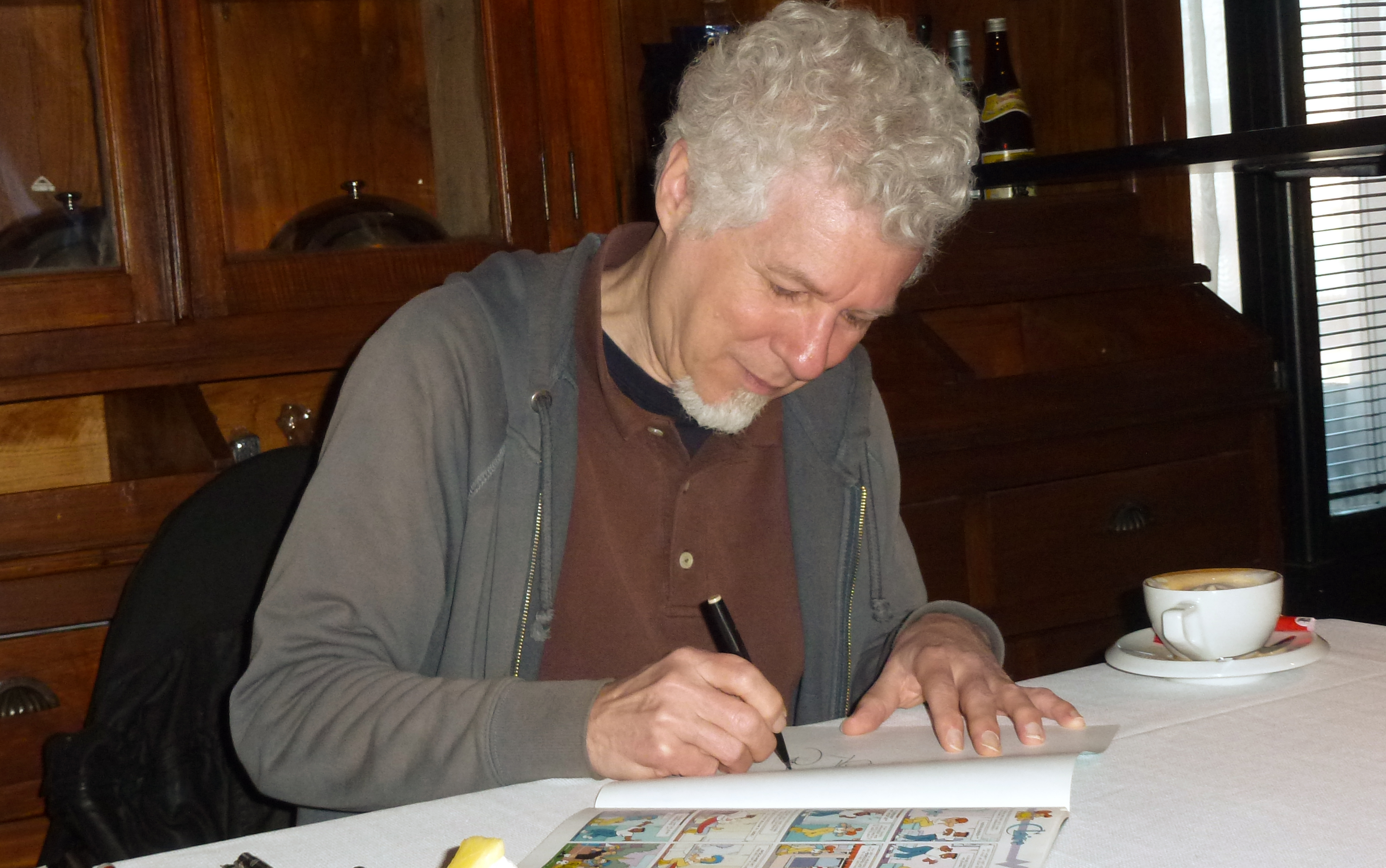 Stripkunstenaar Robert van der Kroft tijdens het 10e evenement Strips op de Markt in Gouda. Van der Kroft is tekenaar van Sjors en Sjimmie en Claire